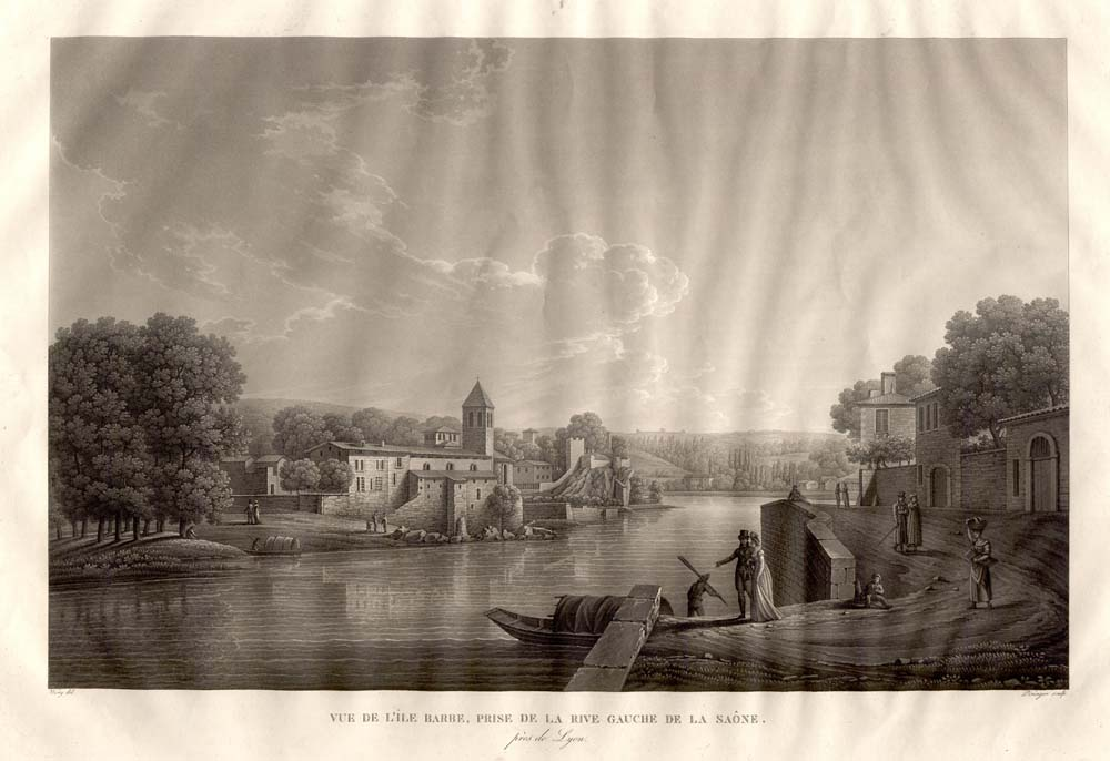 « Vue de l’Ile Barbe prise de la rive gauche de la Saône près de Lyon », dessin de Pierre-Nicolas Wery (1770-1827), gravure de Benedikt Piringer (1780-1826), planche 12 dans François-Marie de Fortis (1768-1847), Atlas du voyage pittoresque et historique à Lyon et sur les rives du Rhône et de la Saône, Paris, Didot l’aîné, 1819.